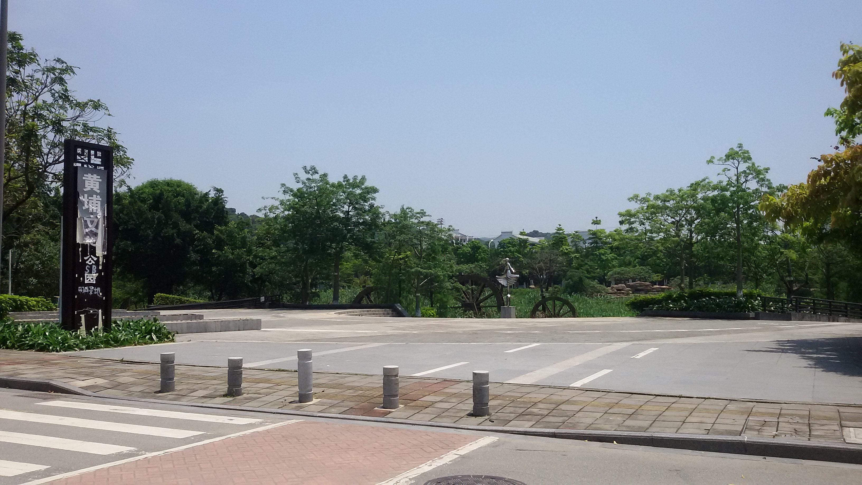 粵語: 蘿崗濕地公園嘅大門